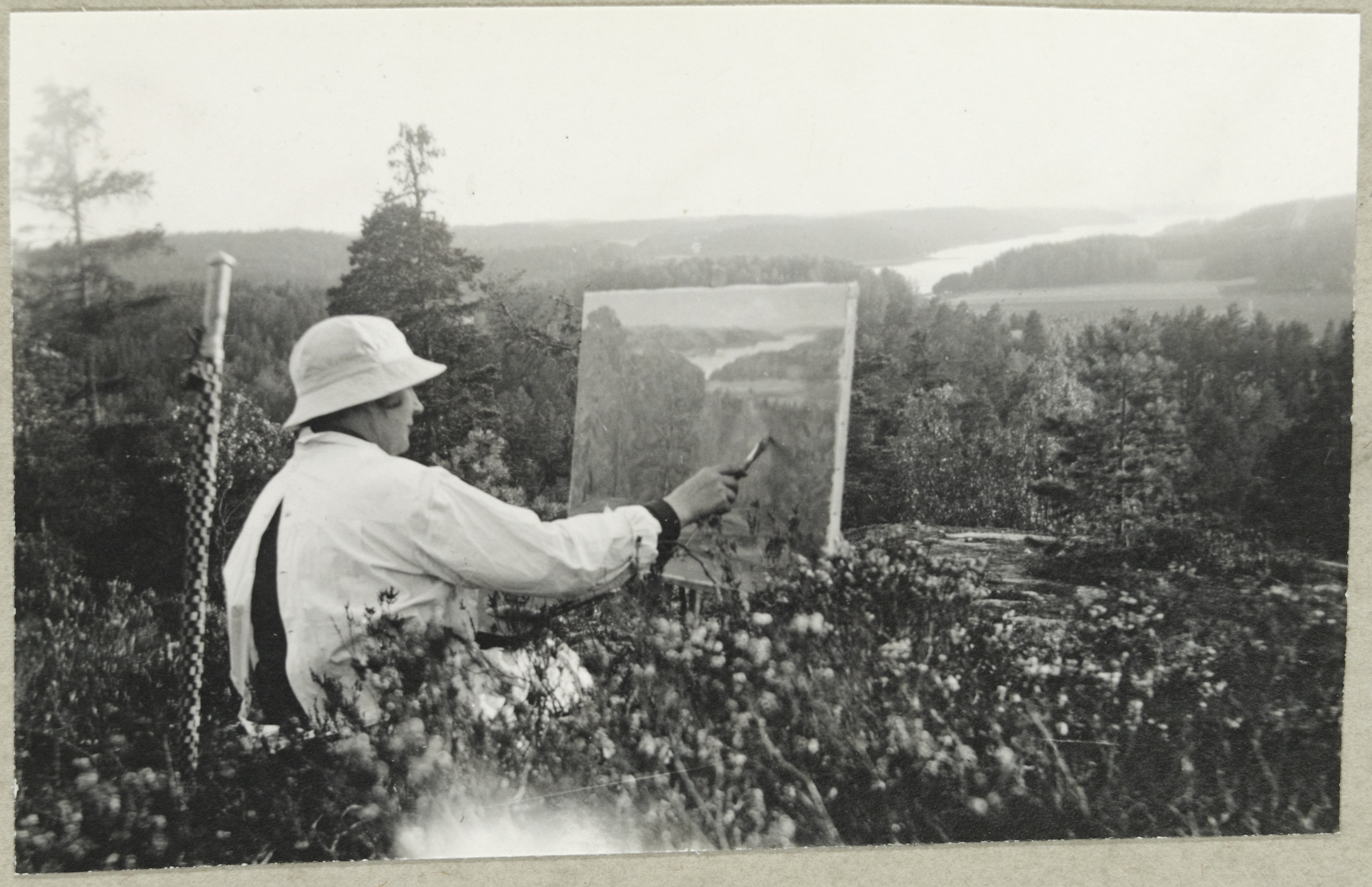 taidemaalari Aino Alli työnsä ääressä; vaaka, mustavalkoinen